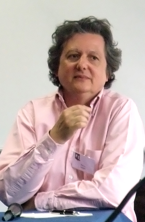 Pierre Haski (Français, né en 1953 à Tunis), journaliste.